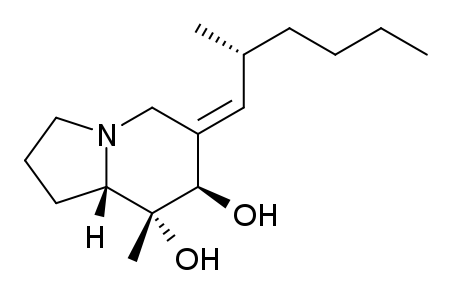 Pumiliotoxin 267A skeletal formula